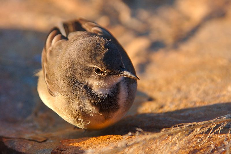 Cape Wagtail (Motacilla capensis)